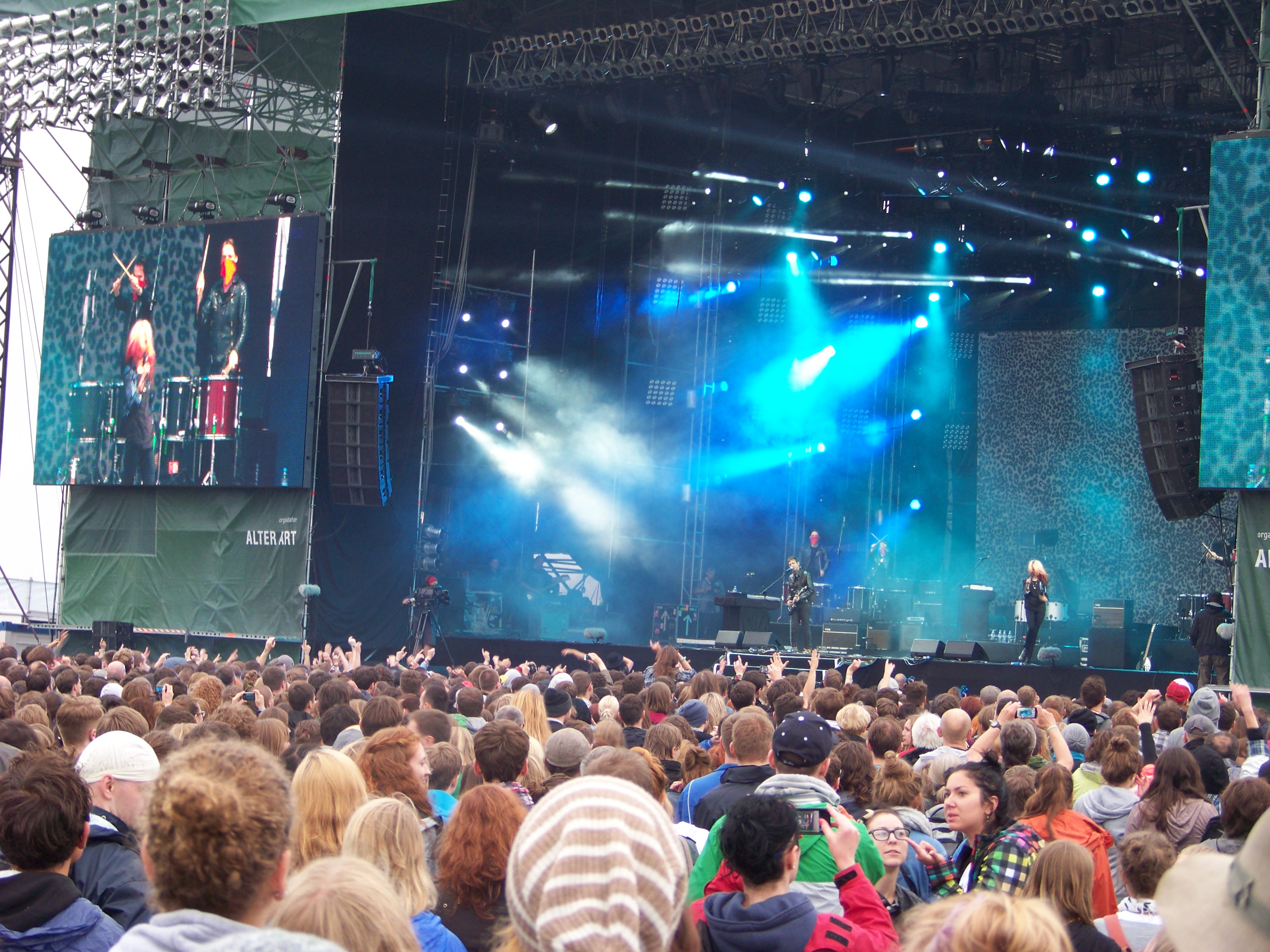 Stowarzyszenie Wikimedia Polska w strefie NGO na Open'er Festivalu 2012.